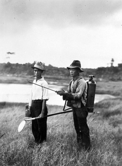 Repronegatief. Een larvenjager en een larvenverdelger aan het werk in verband met malariabestrijding